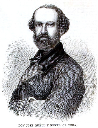 José_Güell_y_Renté